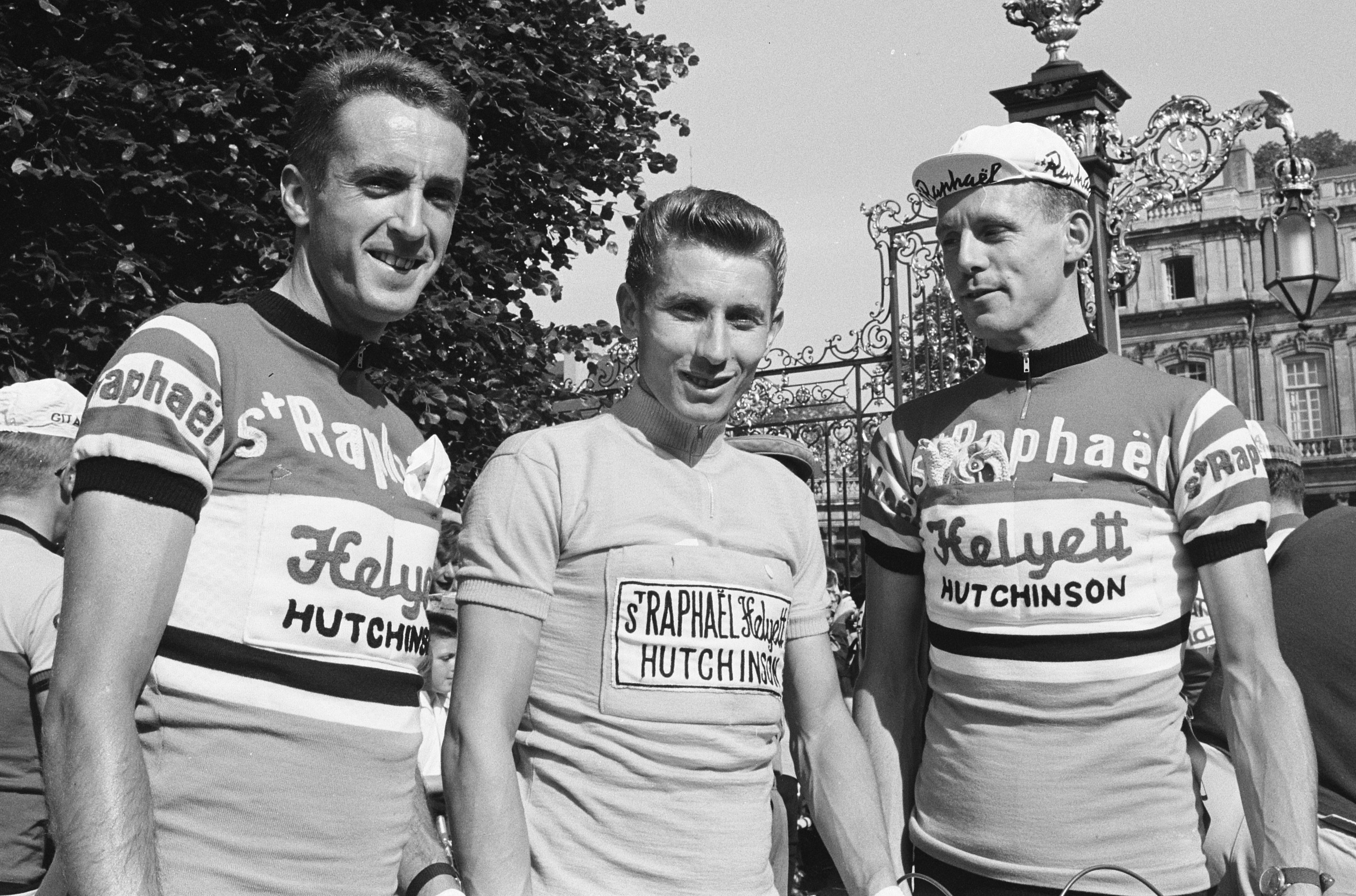 Tour de France 1962 , Ab Geldermans, Jacques Anquetil, [Mies Stolker?].